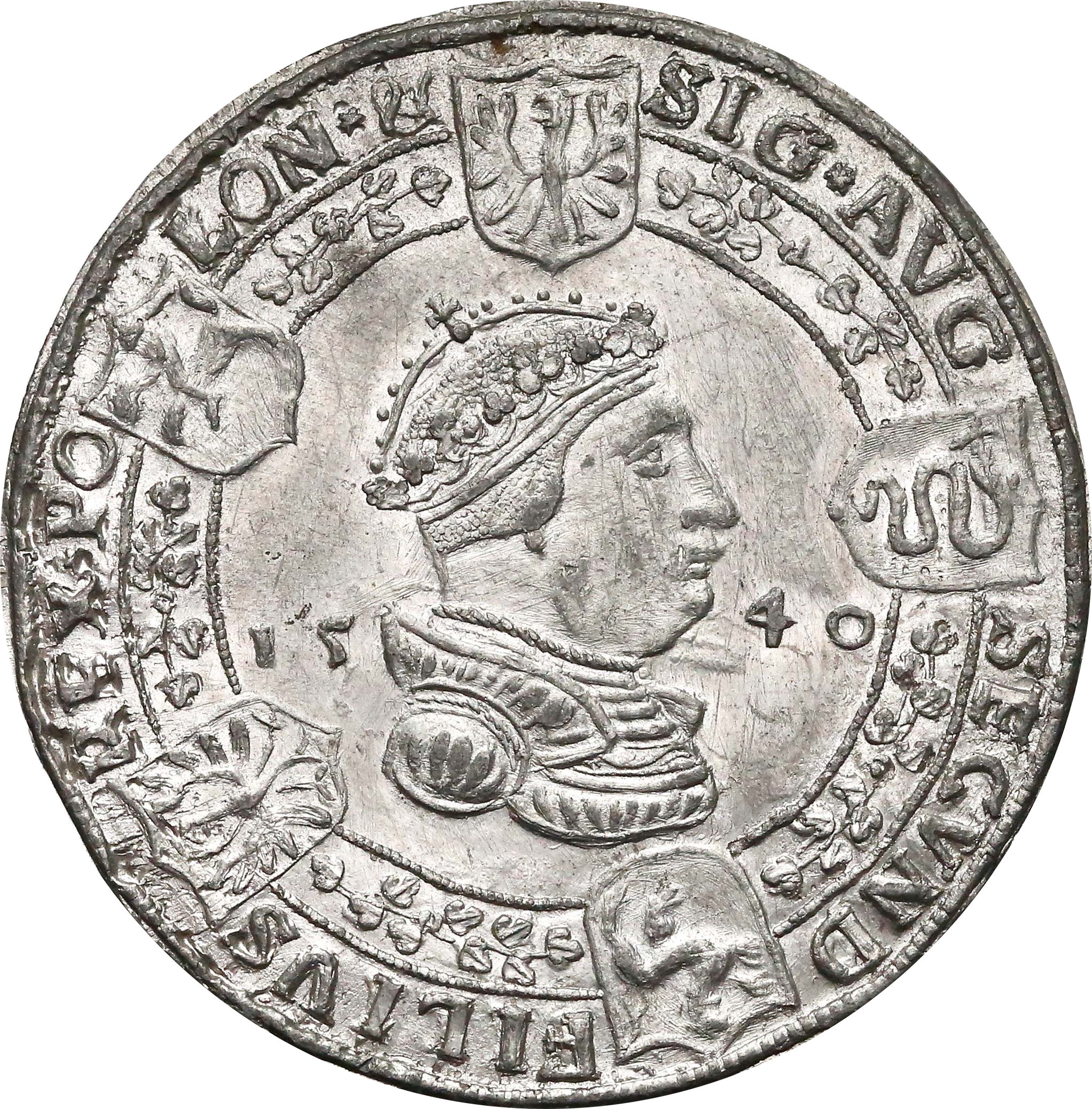 MAJNERT jednostronna cynowa odbitka Talara 1533-1540 Zygmunta I Starego